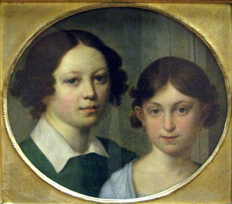 Портрет дочерей скульптора И. П. Мартоса. Нижегородский художественный музей